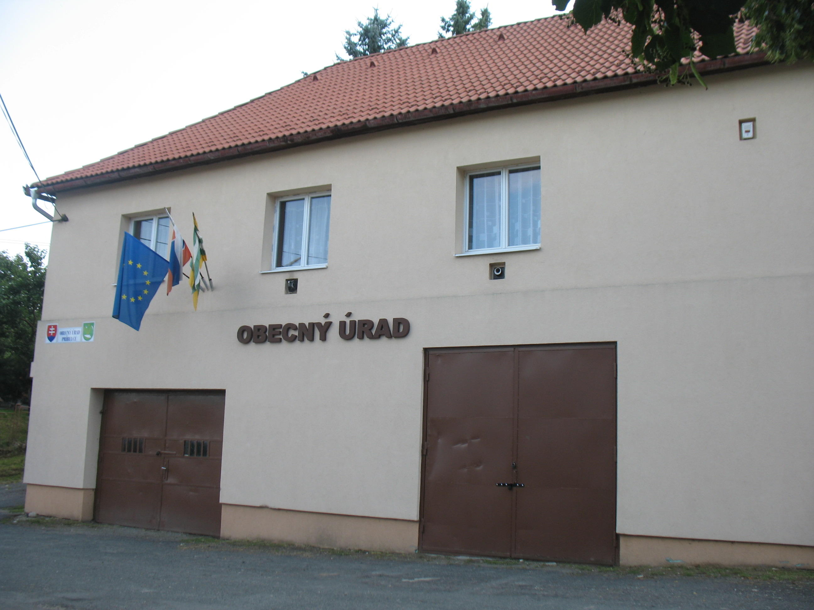 Fehérkút